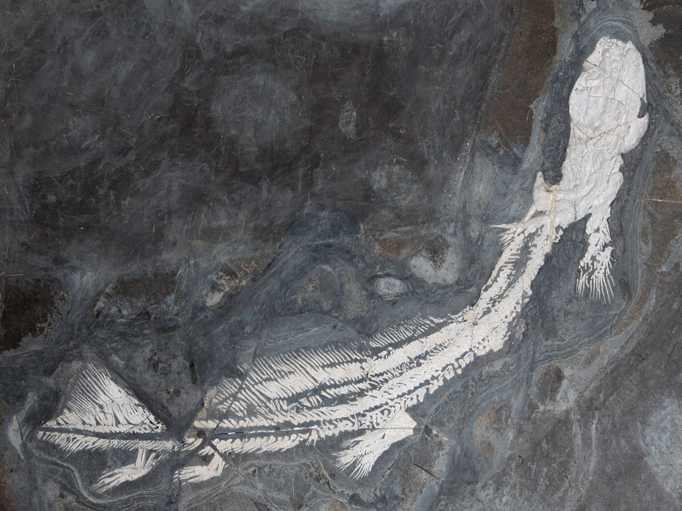 Naturhistorisches Museum Wien